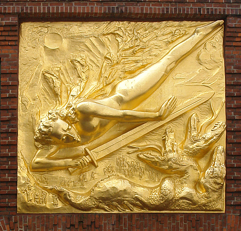 Michael the Archangel: Battle with the dragon Das abgebildete Objekt ist ein geschütztes Kulturdenkmal in der Freien Hansestadt Bremen, mit der Nr. 0209,T001 beim Landesamt für Denkmalpflege registriert.